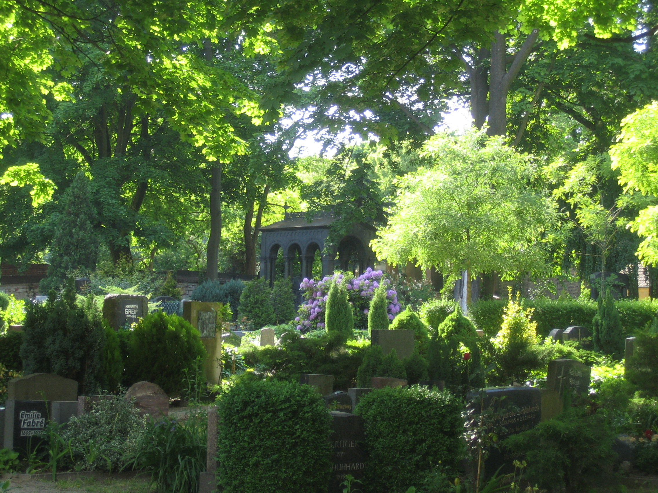 Berlin, Franzoesischer Friedhof (... cemetary). General view.